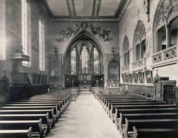 Strasbourg : ancienne église Sainte-Madeleine (1900). Bibliothèque nationale et universitaire de Strasbourg